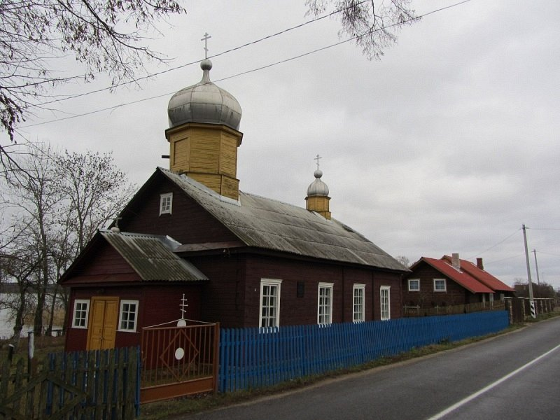 Свір. Свята-Успенская царква